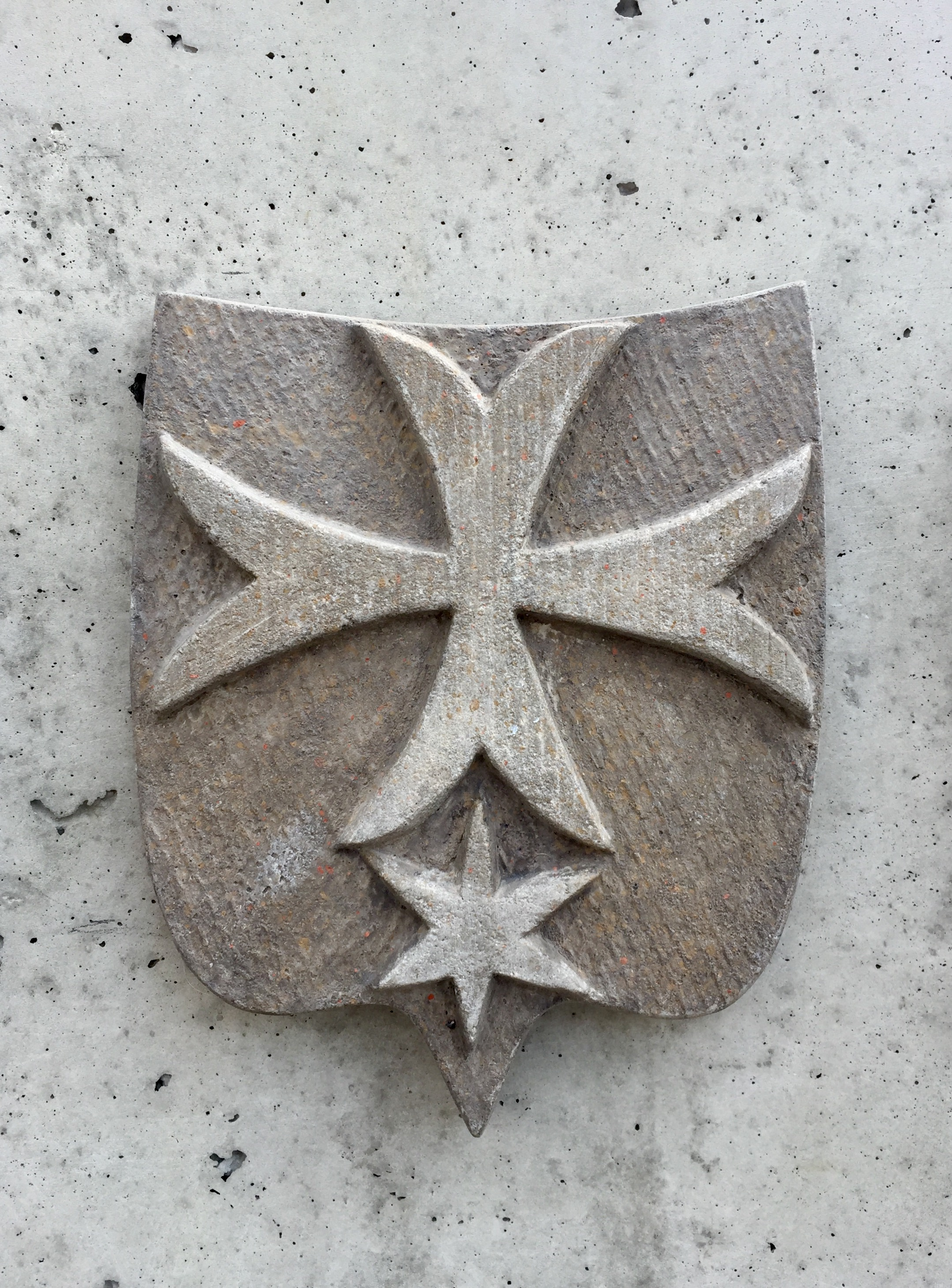 Rytiersky rád krížovníkov s červenou hviezdou_erb rádu